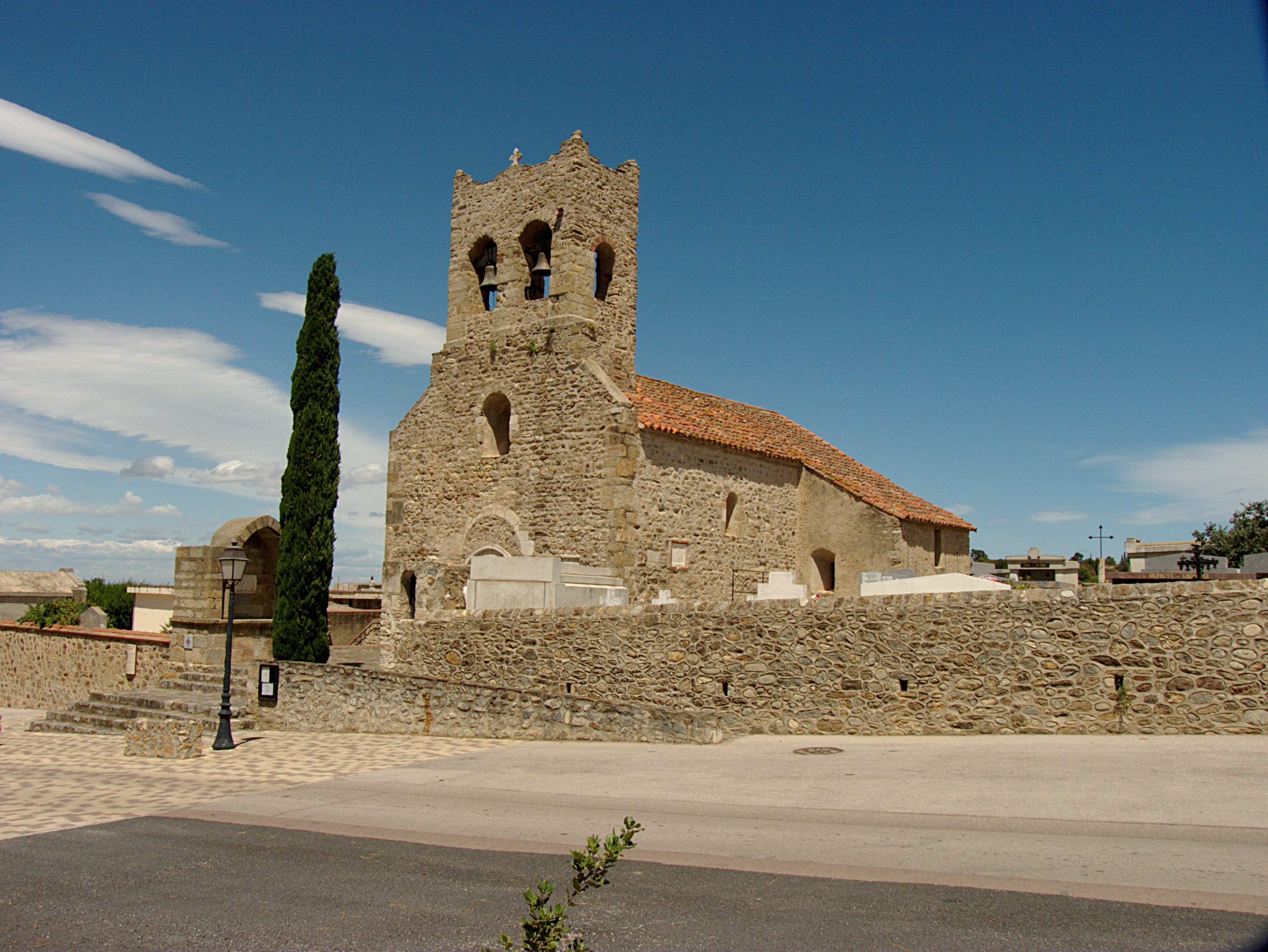 Église Saint-Saturnin (12ème siècle), Montesquieu des Albères (Pyrénées-Orientales, Languedoc-Roussillon, France)